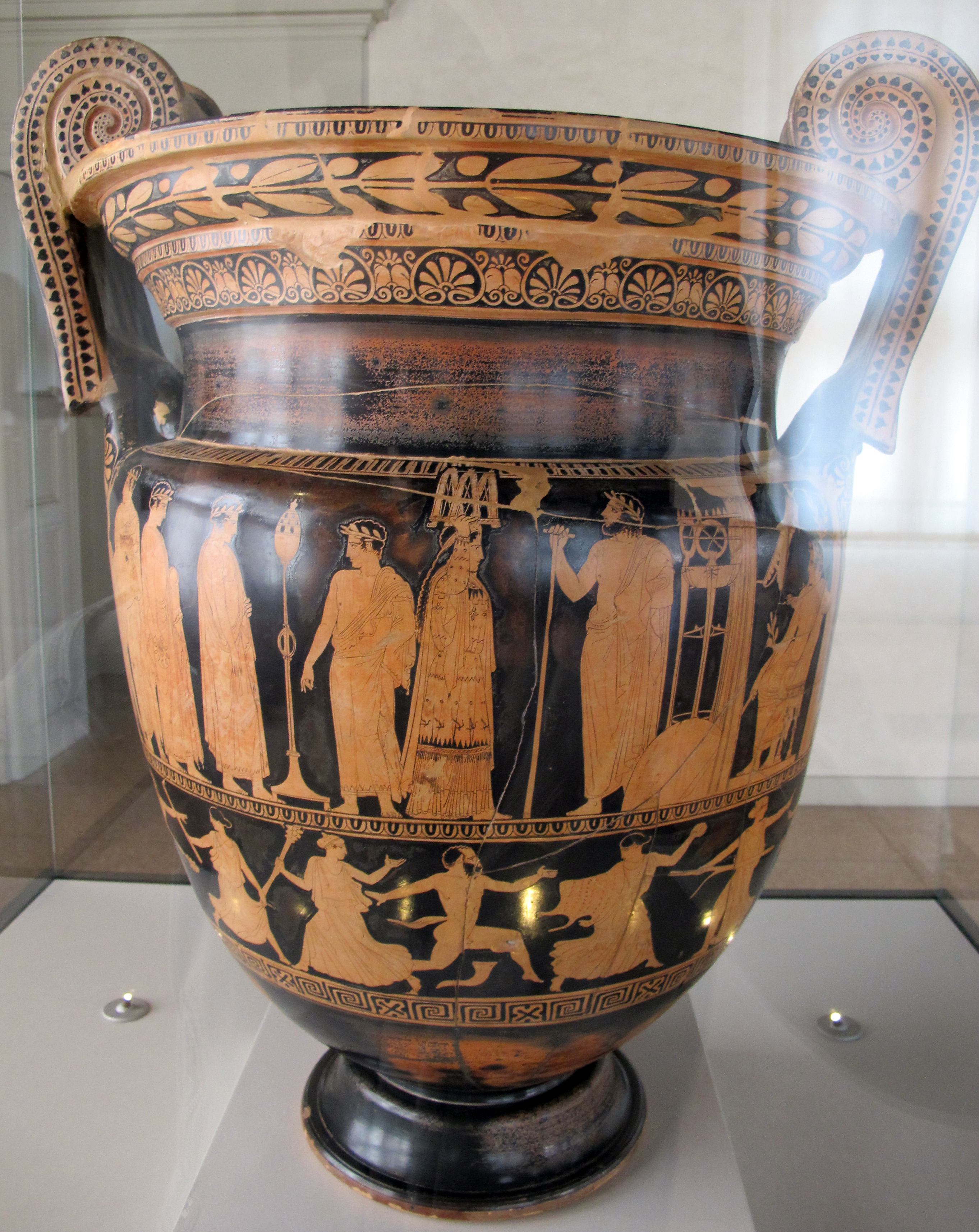 Museo Archeologico Nazionale - MIBAC This is a photo of a monument which is part of cultural heritage of Italy.